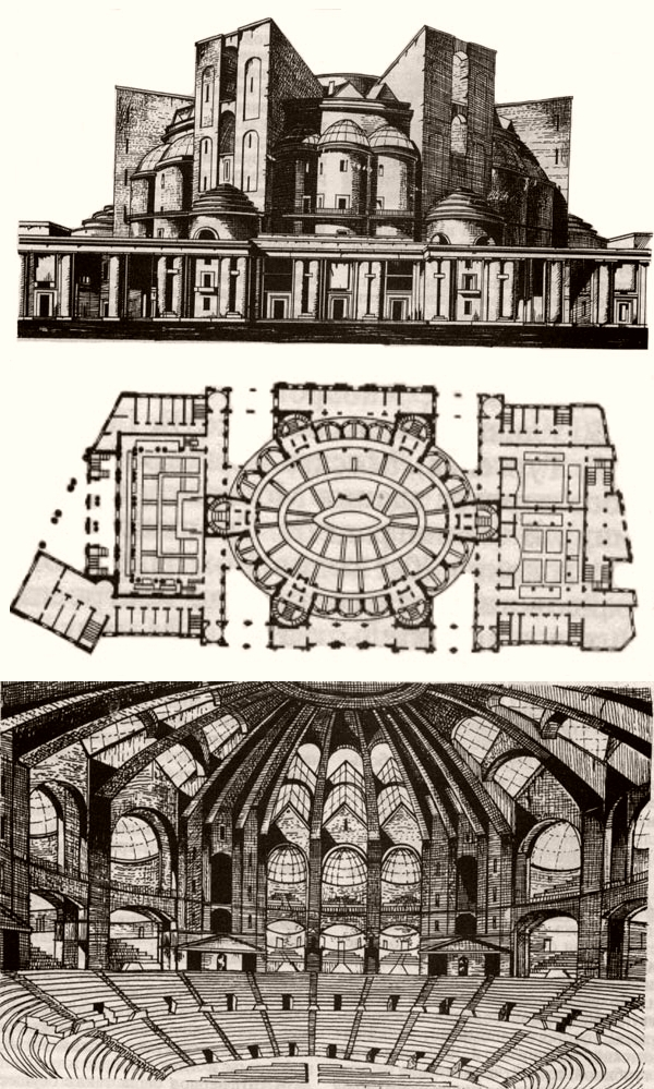 Москва. Конкурсный проект Дворца труда, 1923 г. Н. Троцкий (1-я премия). Фасад, большой зал, план